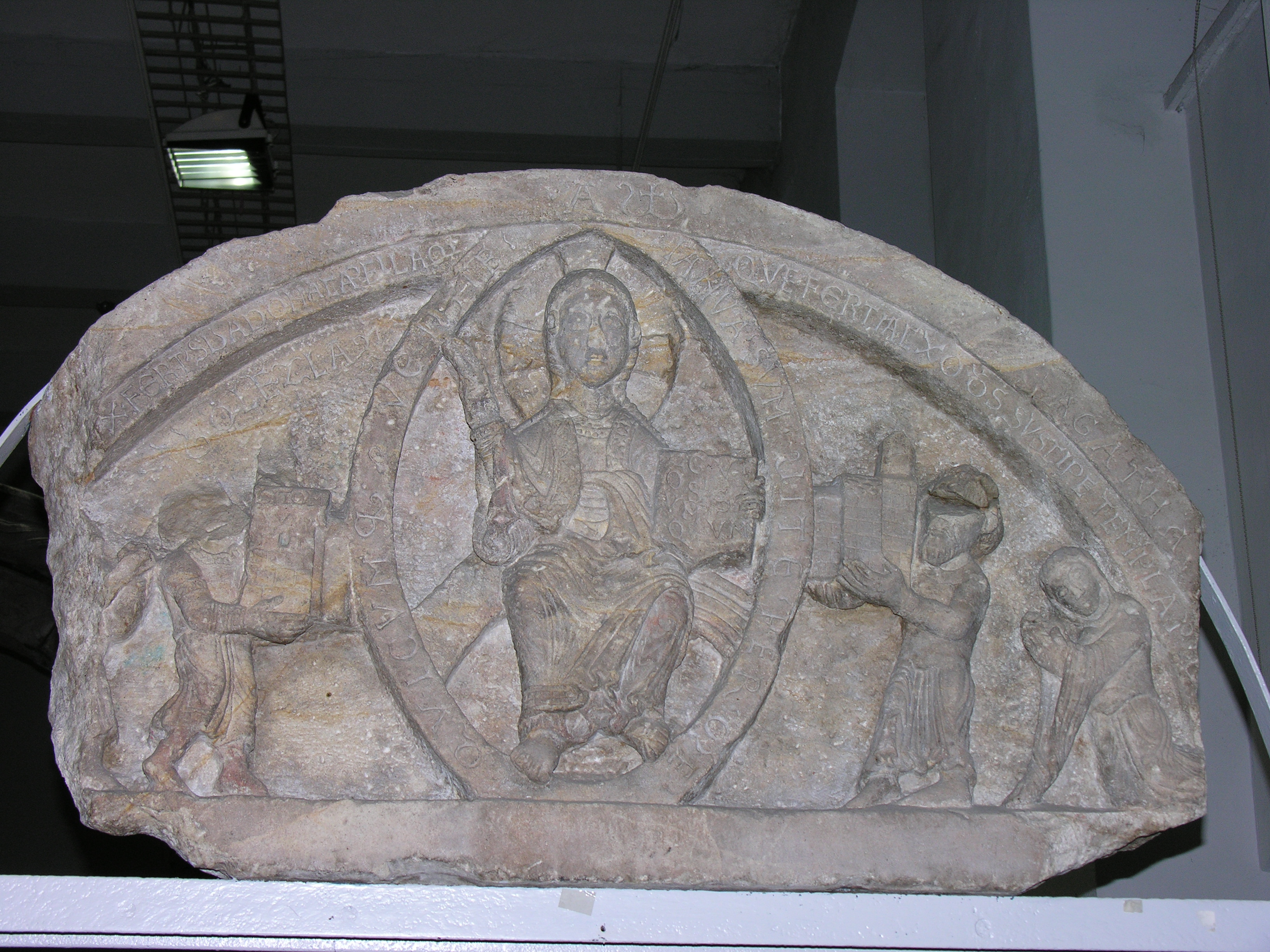 Tympanon fundacyjny opactwa na Ołbinie z przedstawieniem Jaksy, jego żony Agapeji, księcia Boleslawa Kędzierzawego i jego syna Leszka